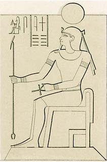 Bůh Šepsej